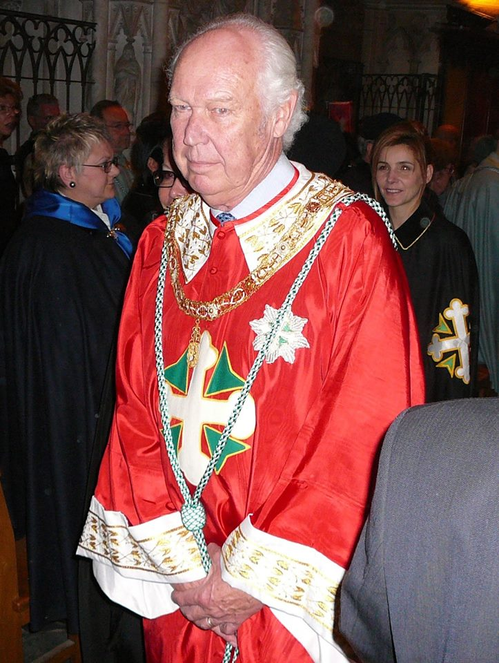 Son Altesse Royale le prince Victor Emmanuel de Savoie avec les vêtements de l'Ordre des Saints Maurice et Lazare dans 'abbaye Altacomba